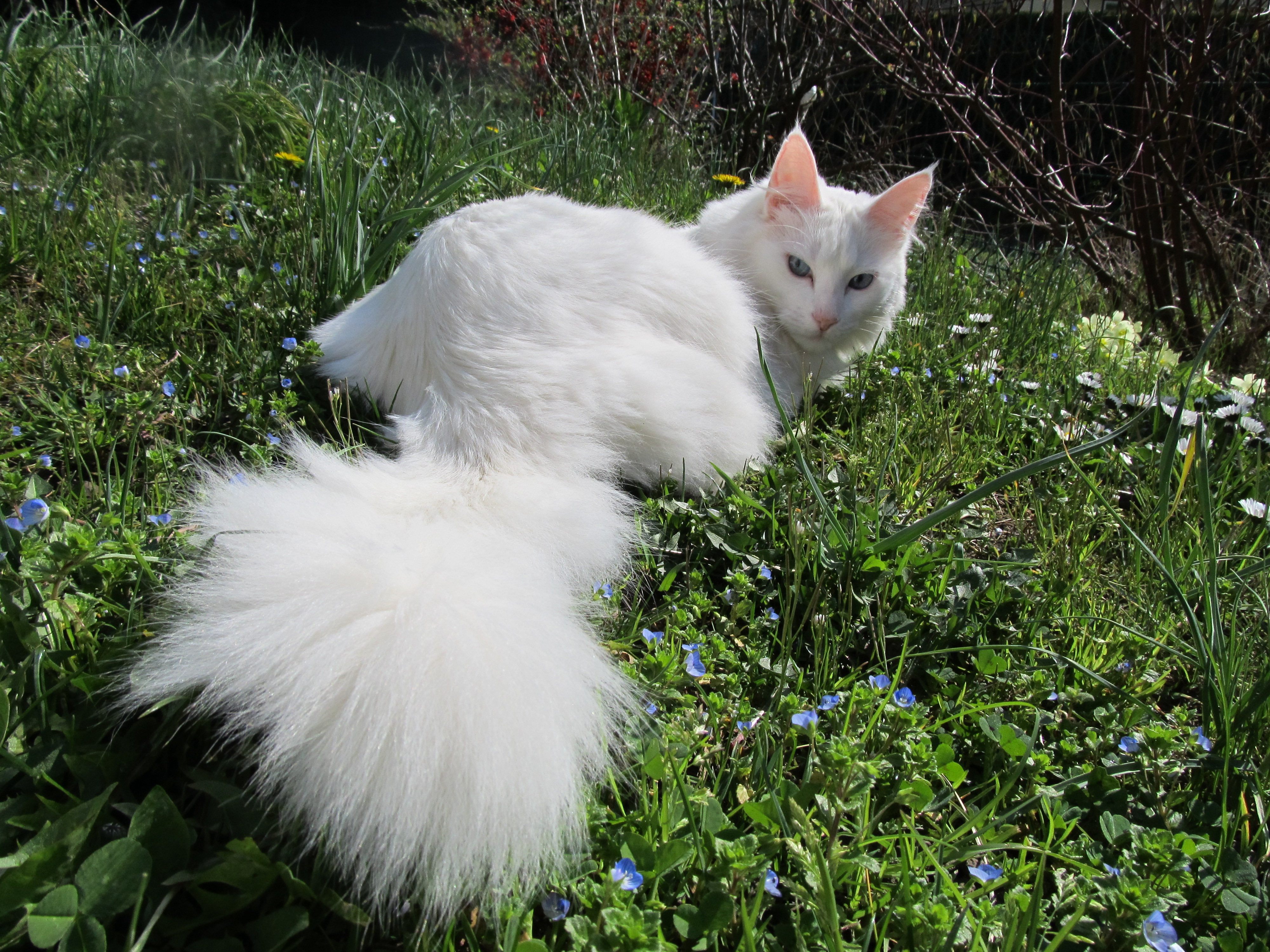 angora turc blanc yeux bleus